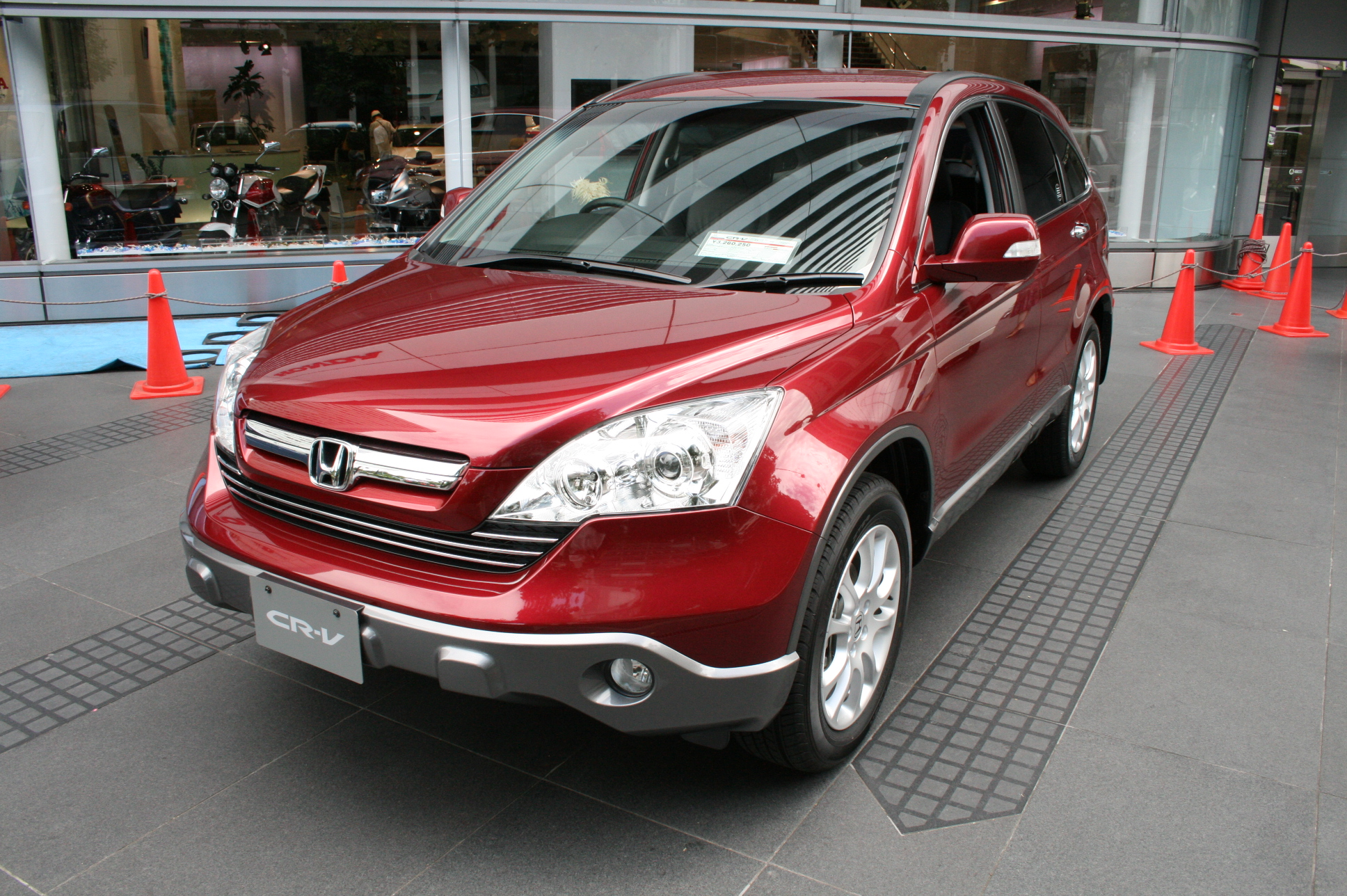 Hodna CR-V